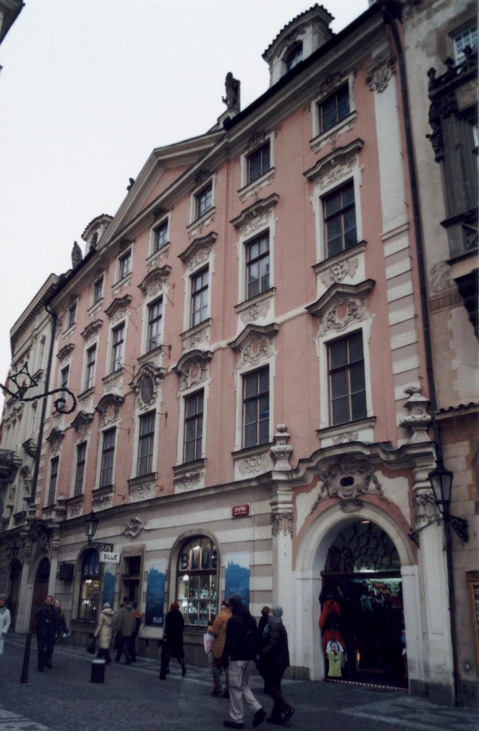 Sixtův dům v Celetné ulici na Starém Městě v Praze